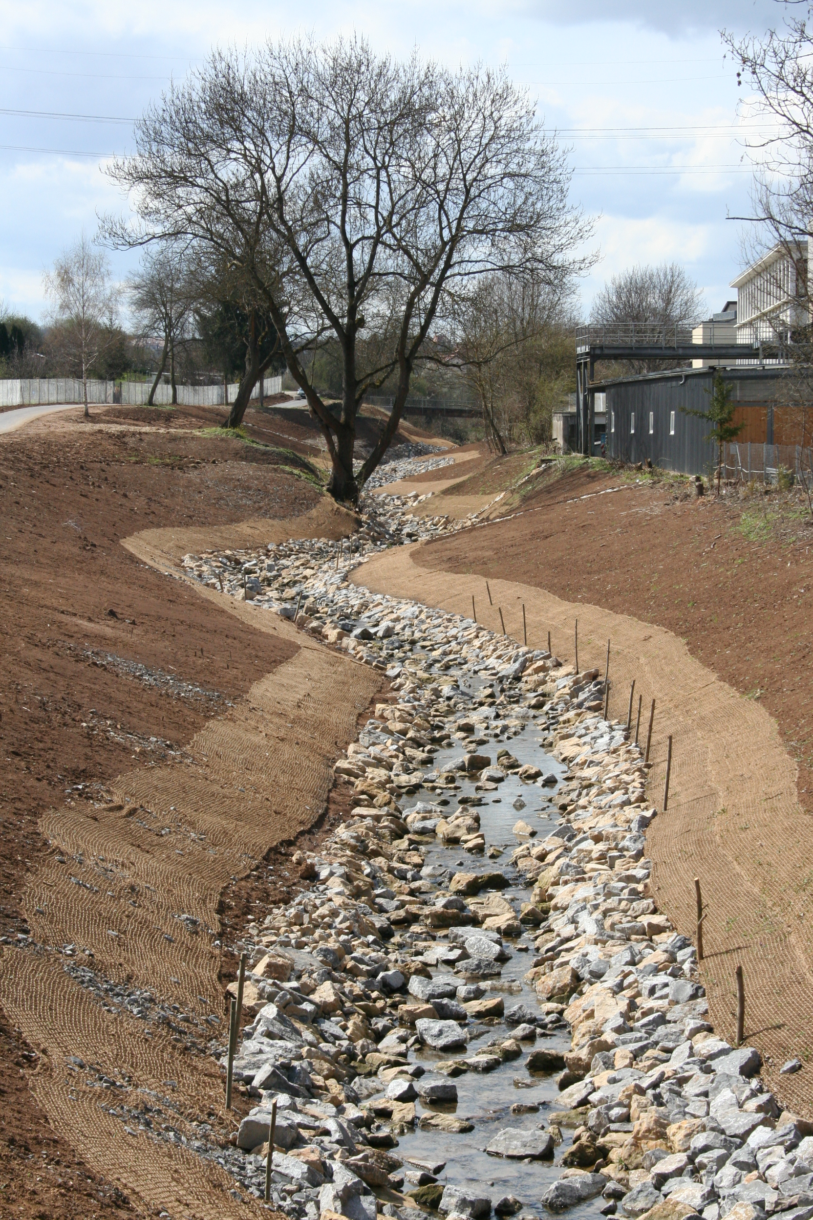 Renaturierung eines Teilstücks des Feuerbaches in Stuttgart zwischen Stuttgart-Zazenhausen und Stuttgart-Rot im Jahr 2010